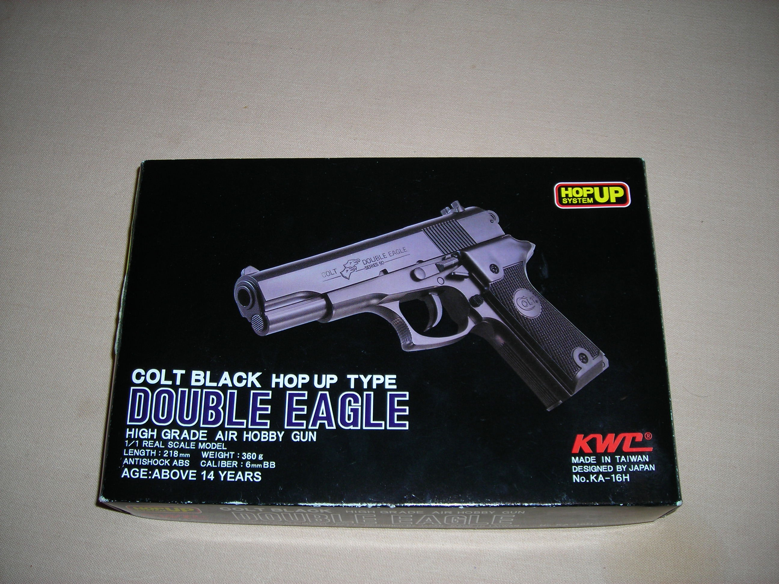 Description De verpakking van een spring gun Date12/01/2007SourceZelfgemaakte fotoAuthorErik1980 De verpakking van een spring gun